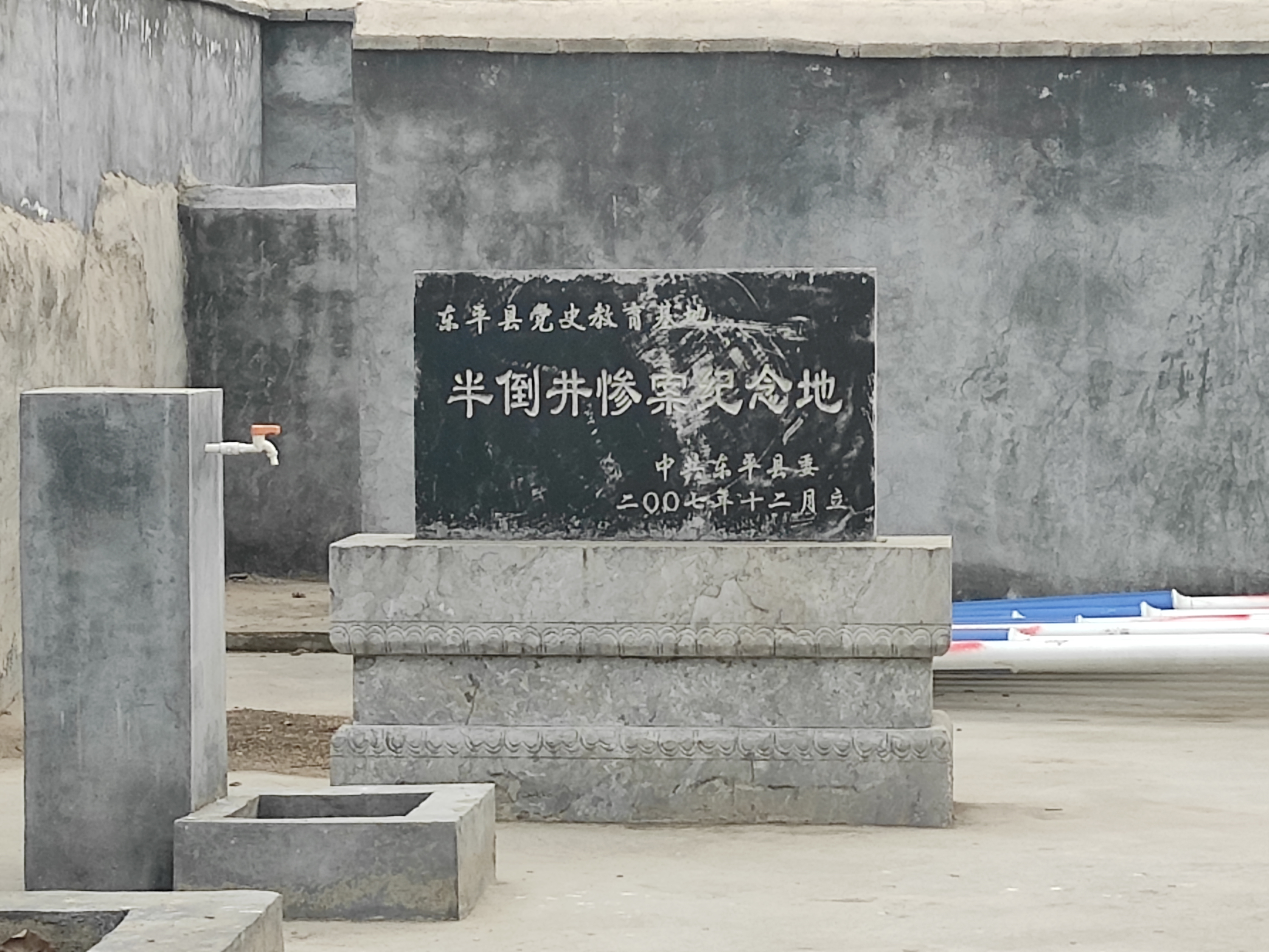 中文（中国大陆）: 半倒井惨案纪念地碑